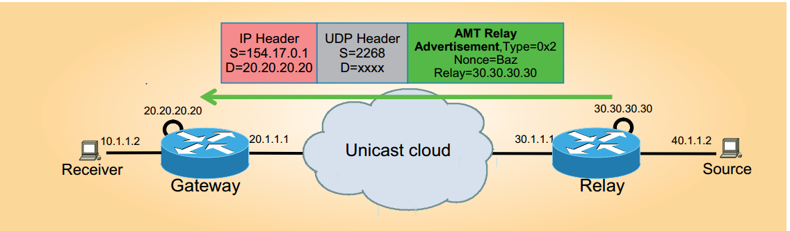 AMT Relay Advertisement message